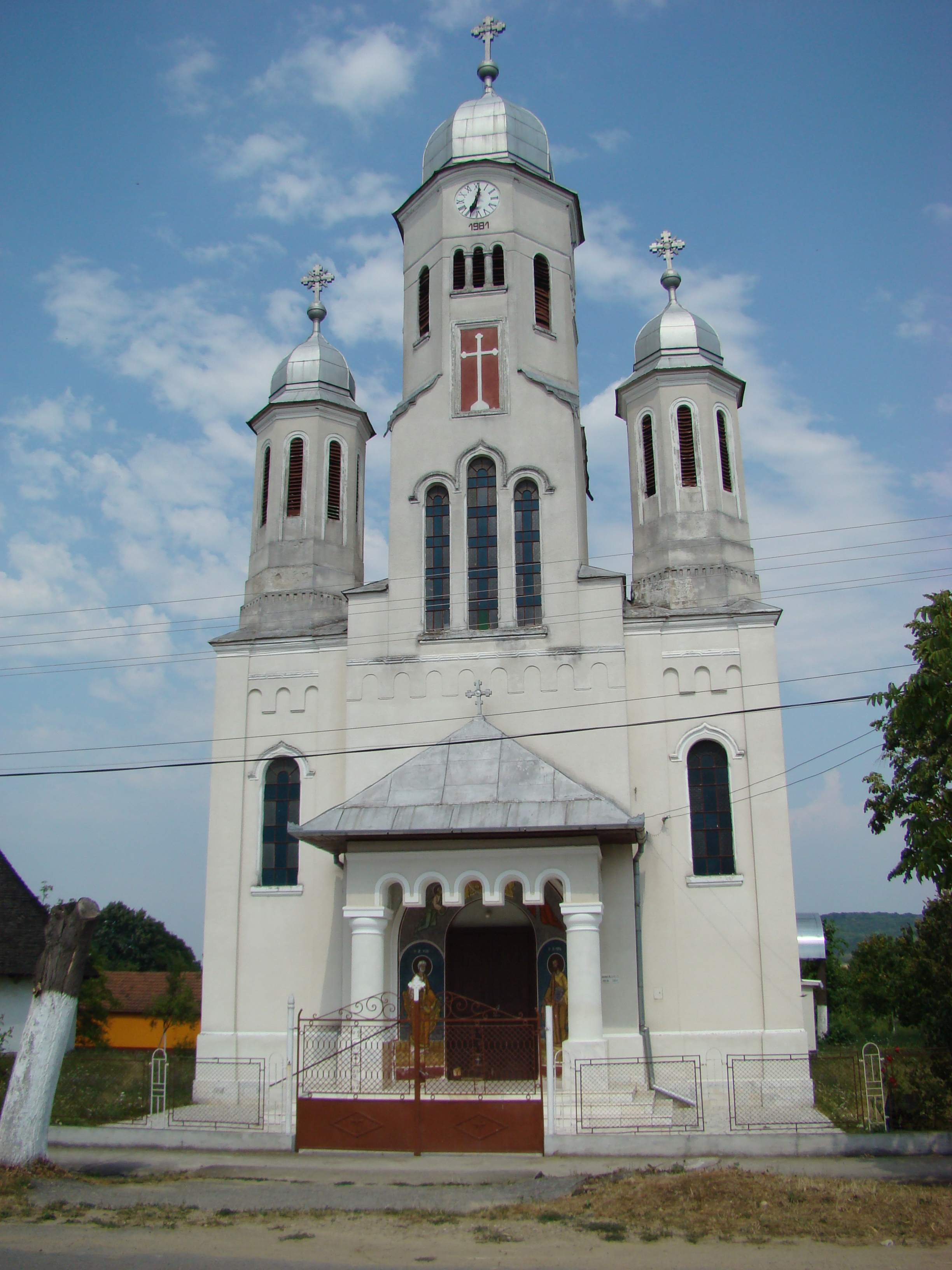 Biserica de lemn „Cuvioasa Paraschiva” din Curtea-Timiș